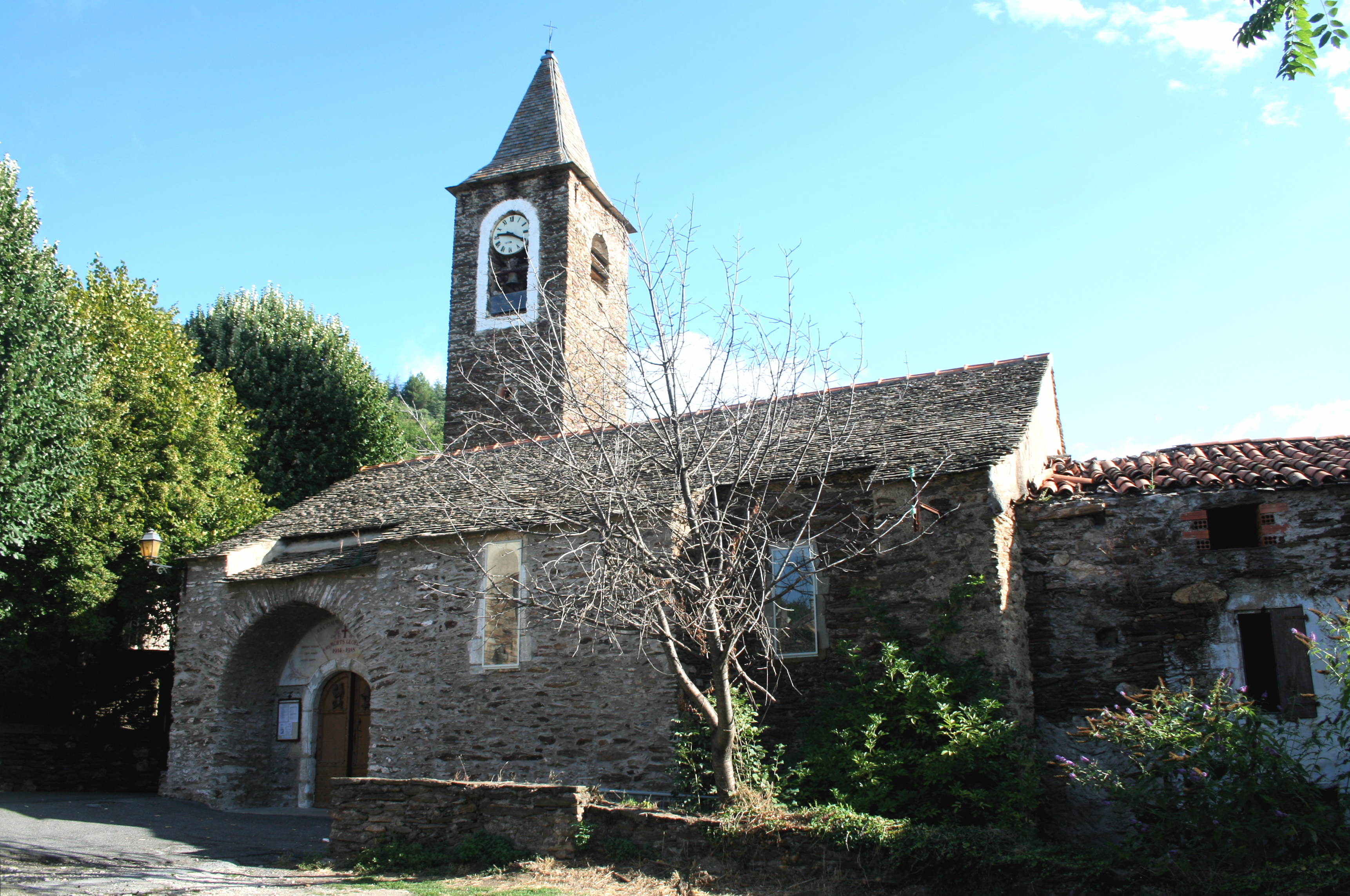 Combes (Hérault) - église Saint-Pierre-et-Saint-Paul.